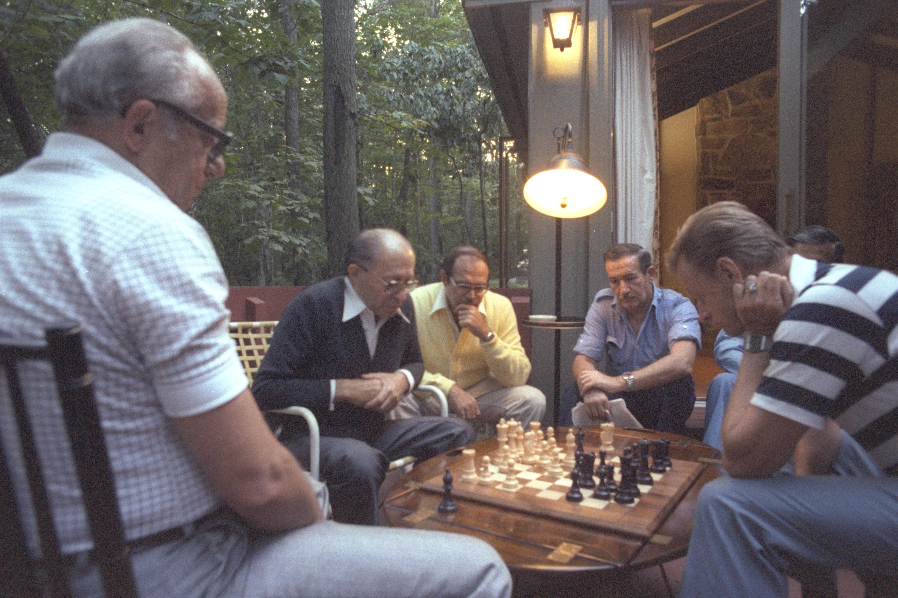 A chess game between Prime Minister Menahem Begin and U.S. National security adviser Zbigniew Brzezinski in Camp David during the peace negotiations between Israel and Egypt. שיחות שלום בין ישראל למצרים בקמפ דיויד, ארהב. בצילום, ראש הממשלה מנחם בגין משחק שח מט עם יועץ נשיא ארהב לבטחון לאומי זבגנייב בז'יז'ינסקי ברגע של מנוחה. משמאל מנהל לשכת רהמ יחיאל קדישאי, מביטים על המשחק אפרים פורן ושמחה דיניץ.